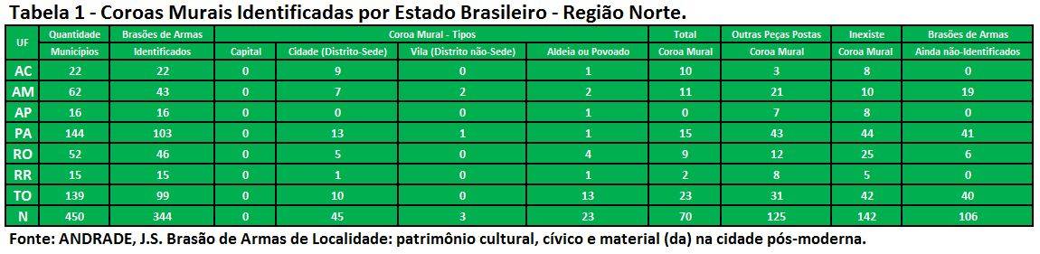 Quadro Demonstrativo dos Tipos de Coroas Murais identificadas no Brasil por Estados. Fruto de mais de dez anos de pesquisas sobres os símbolos municipais brasileiros